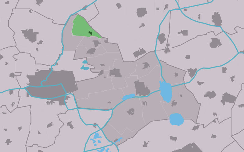 Kaartsje fan himrik fan Aldtsjerk